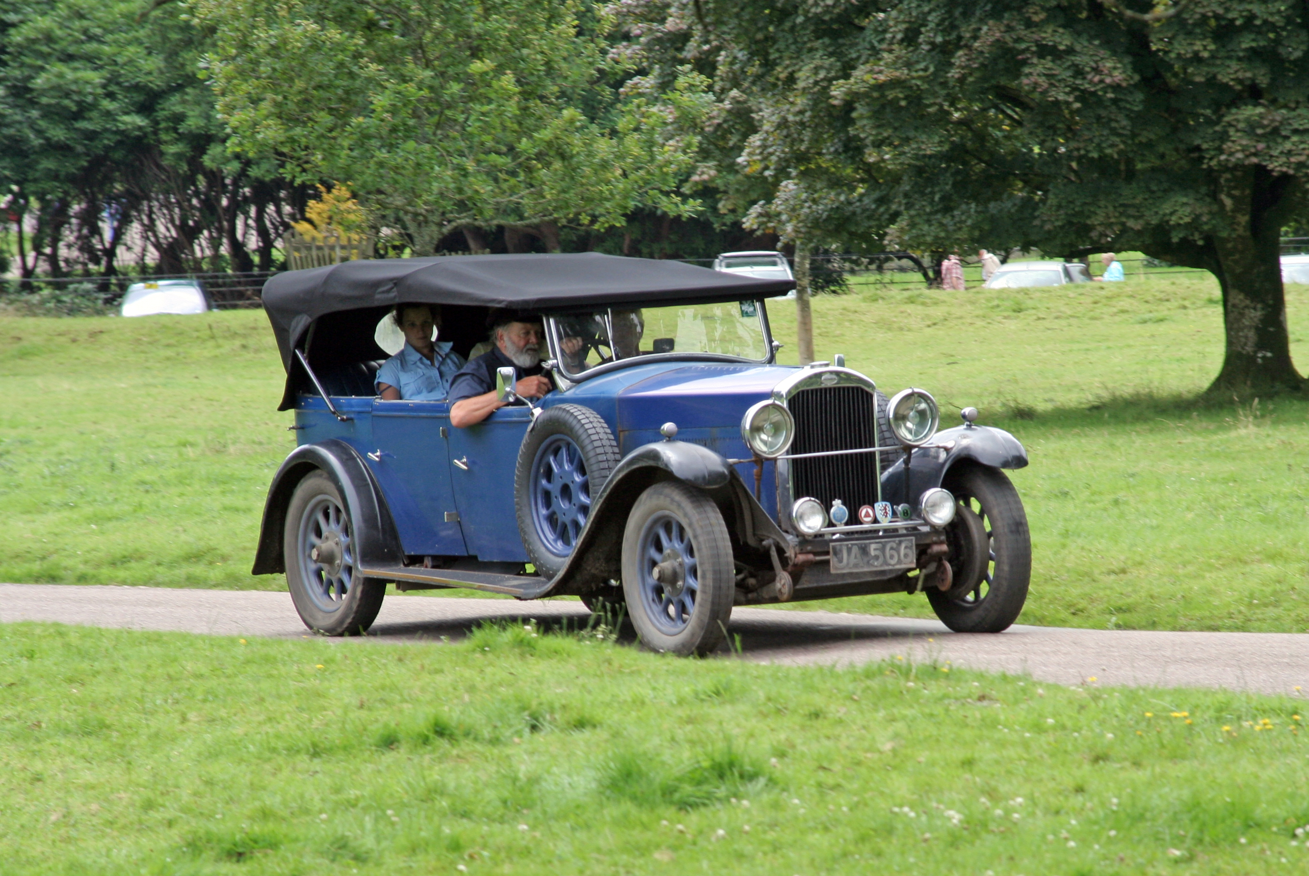 Humber 16/50 Tourer 1930